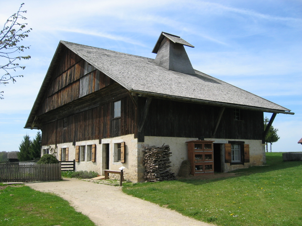 Eco Musée Maisons Comtoises de Nancray dans le Doubs - France